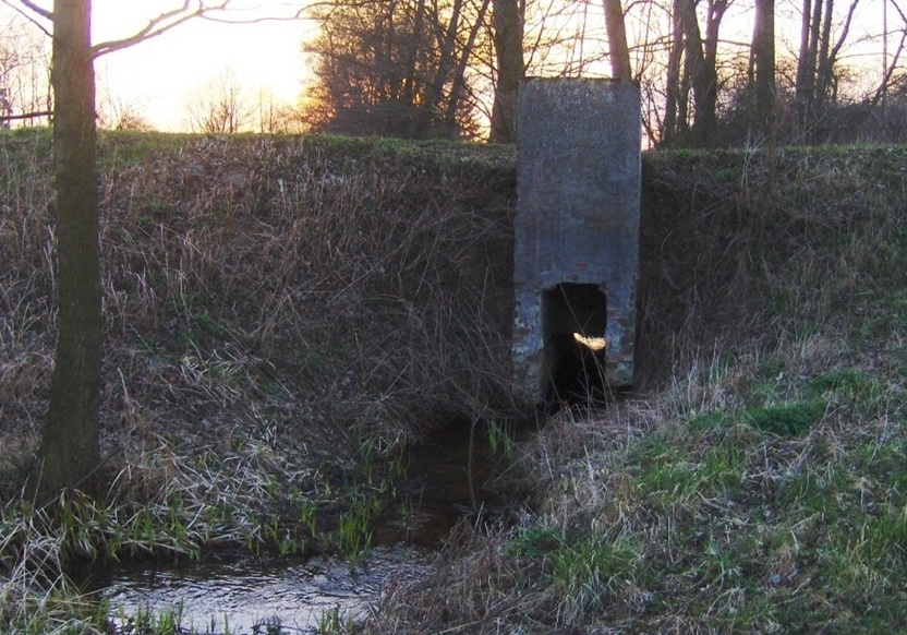 Mnich do regulowania przepływu wody - pozostałość po nieistniejących już stawach między dzisiejszą szkołą a starym pierścieniem zabudowy wsi